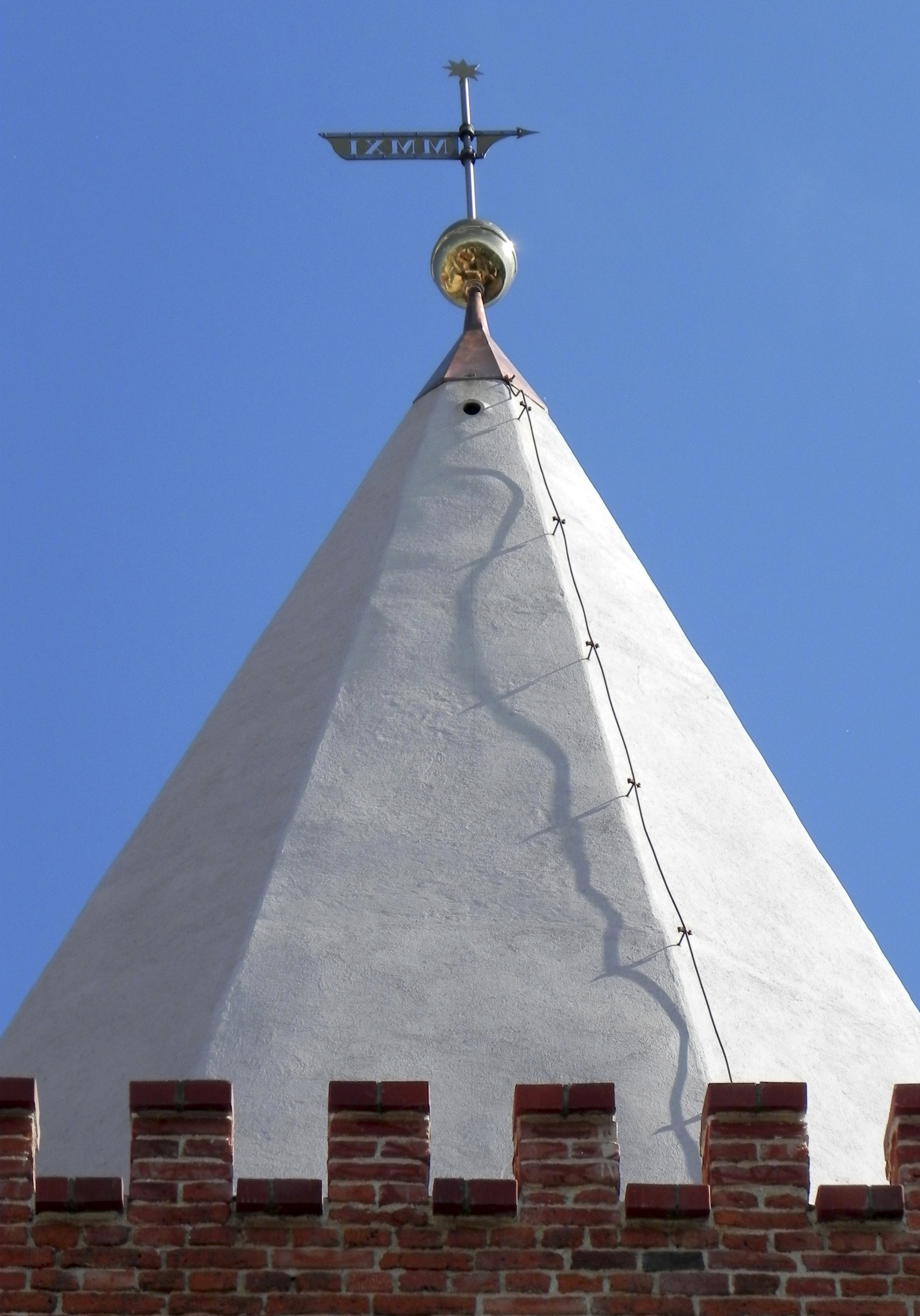 Bystrzyca Kłodzka, Brama Wodna, XIV